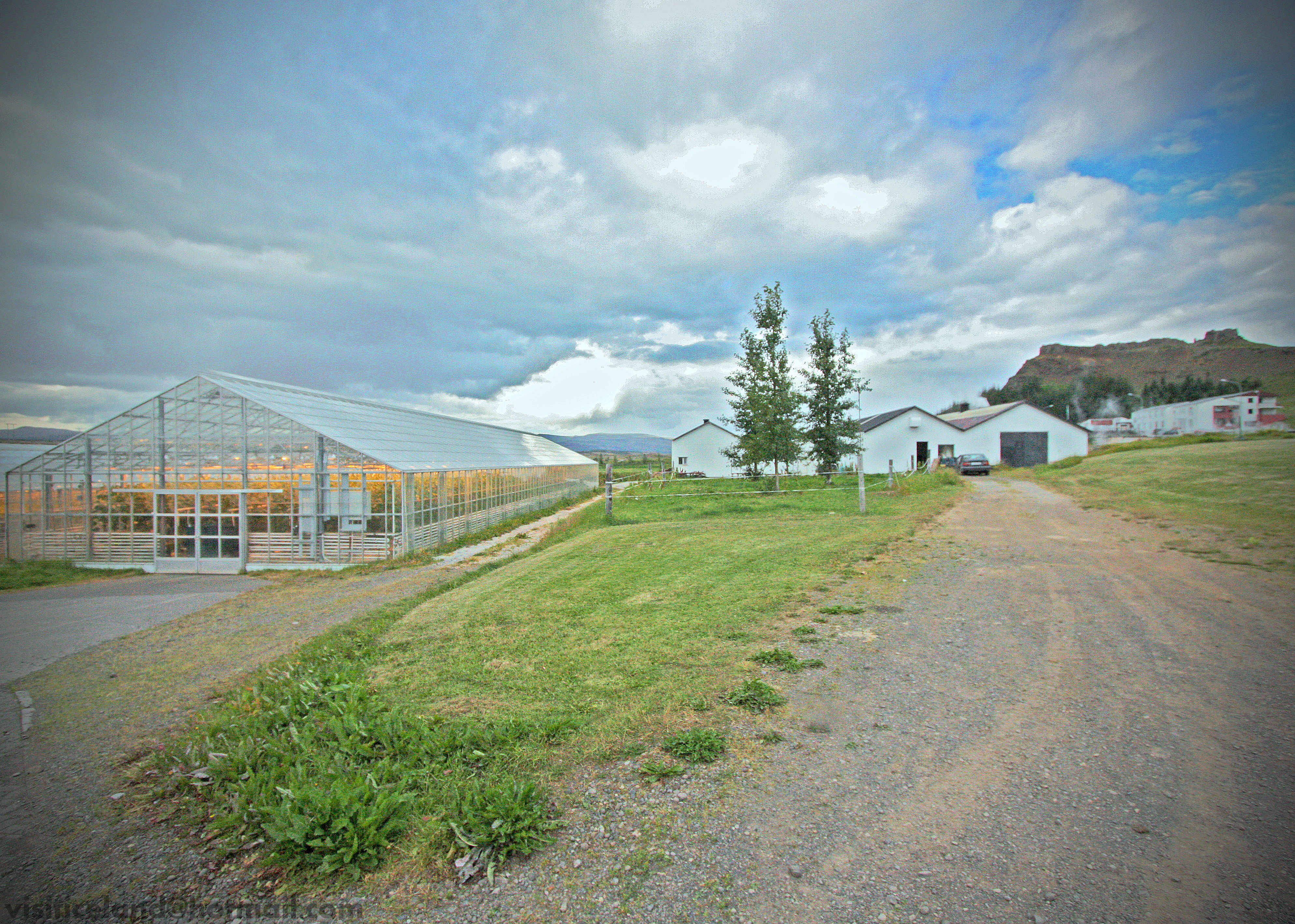 Laugaland/Varmaland in Borgarfjörður